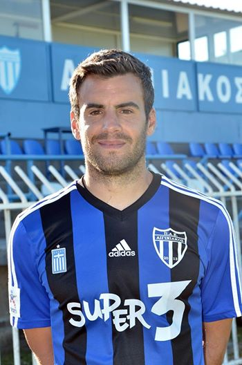 Aiginiakos Fc